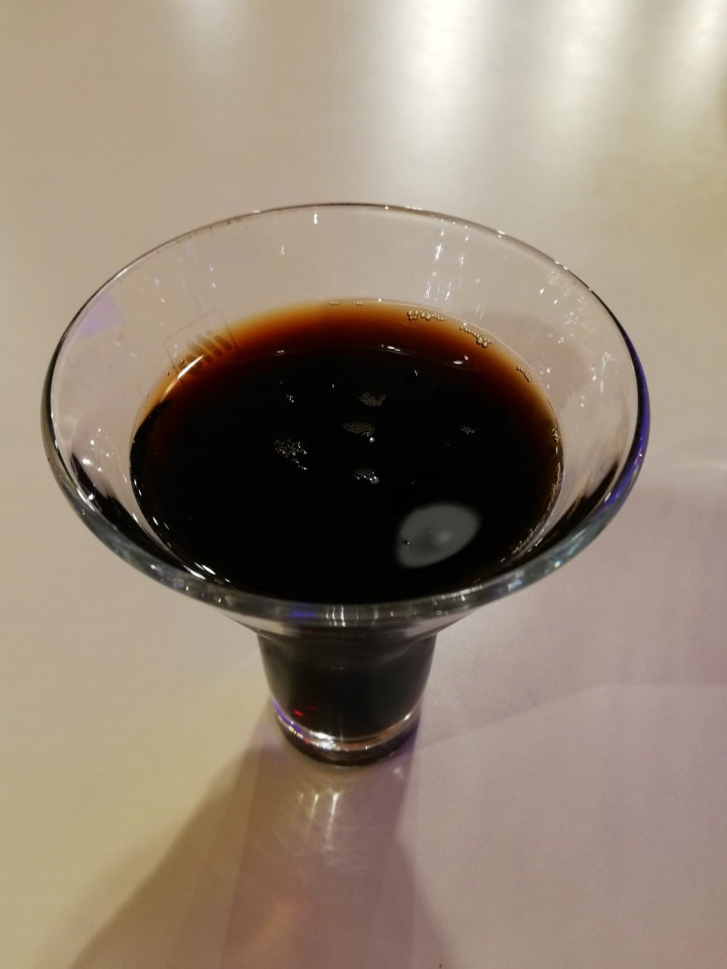 Bicchiere di gassosa al caffè